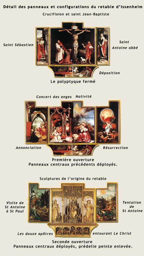 Détails des ouvertures du retable d'Issenheim